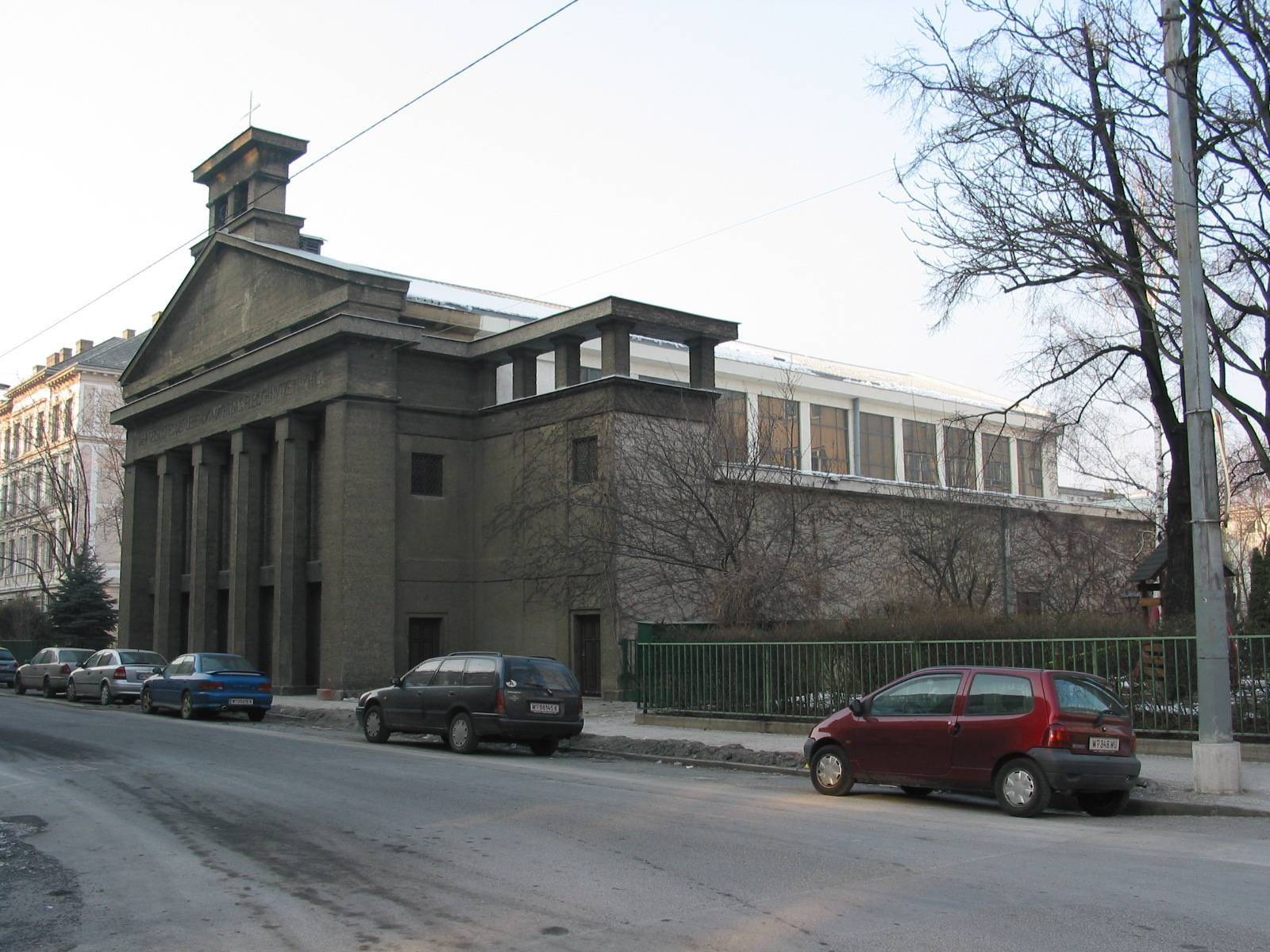 HeiliggeistKirche (Schmelzer Pfarrkirche) by Jože Plečnik, Vienna XVI, 2006-01-28 selfmade photo